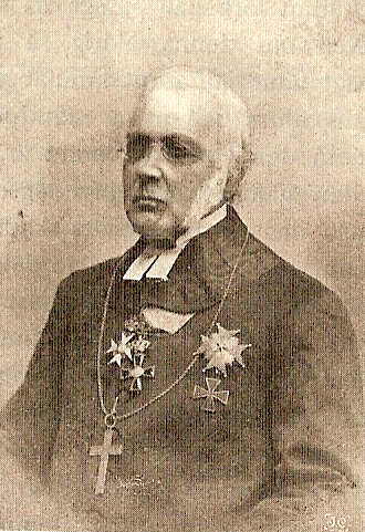 Claes Herman Rundgren (1819-1906).